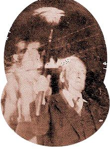 Thomas Hooper transporta la antorcha durante los festejos del Cicuentenario de Rosario Central